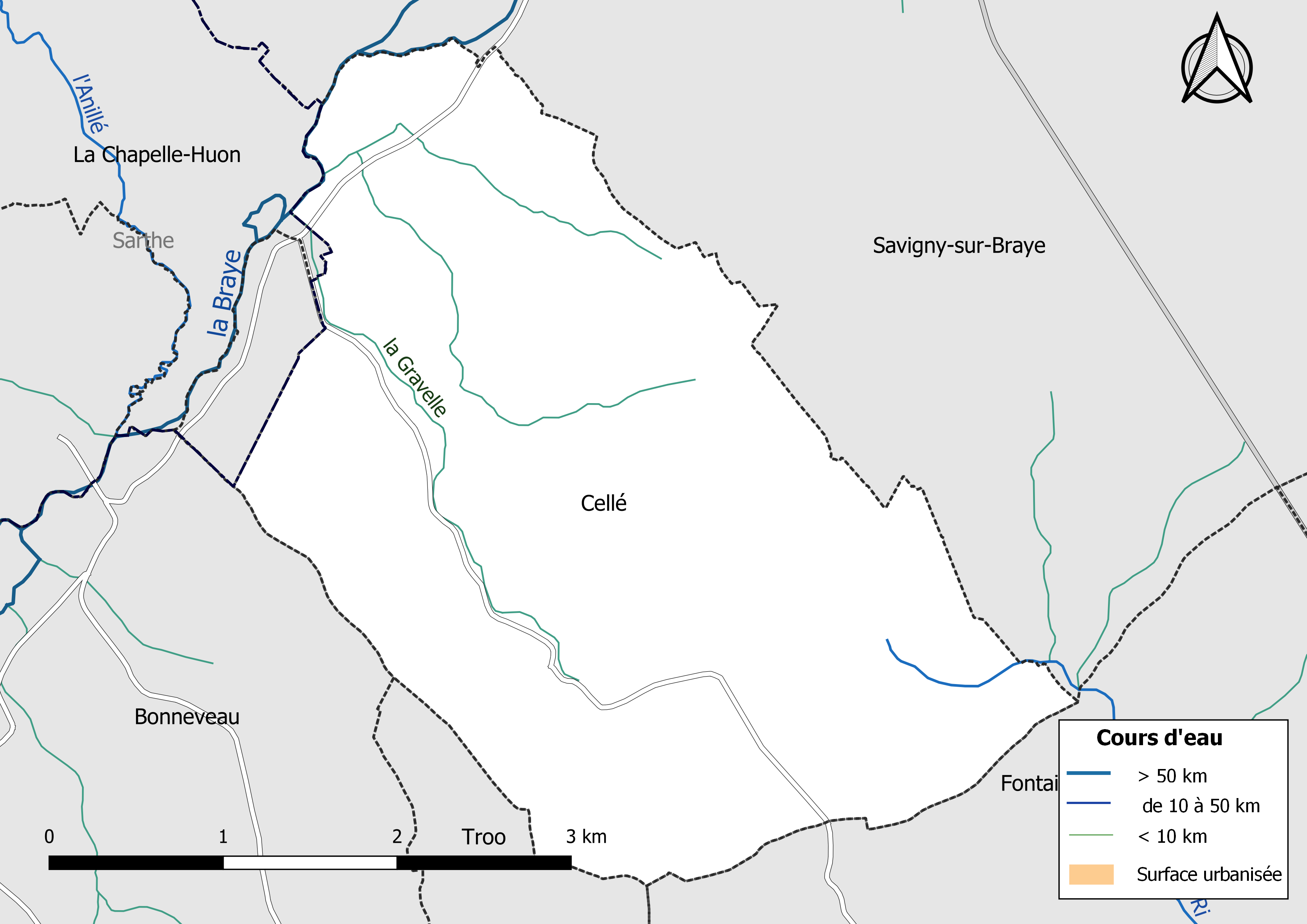 Carte du réseau hydrographique de la commune de Cellé (Loir-et-Cher, France).